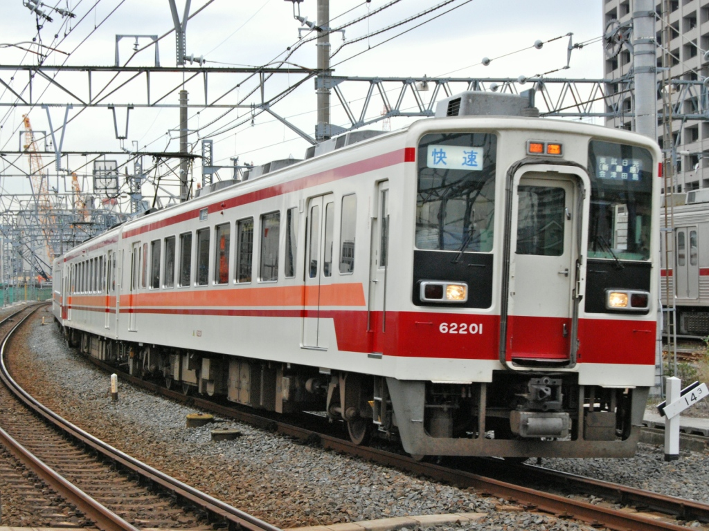 会津鉄道6050系200番台電車62201編成（2008/11/5・業平橋～曳舟間にて撮影）